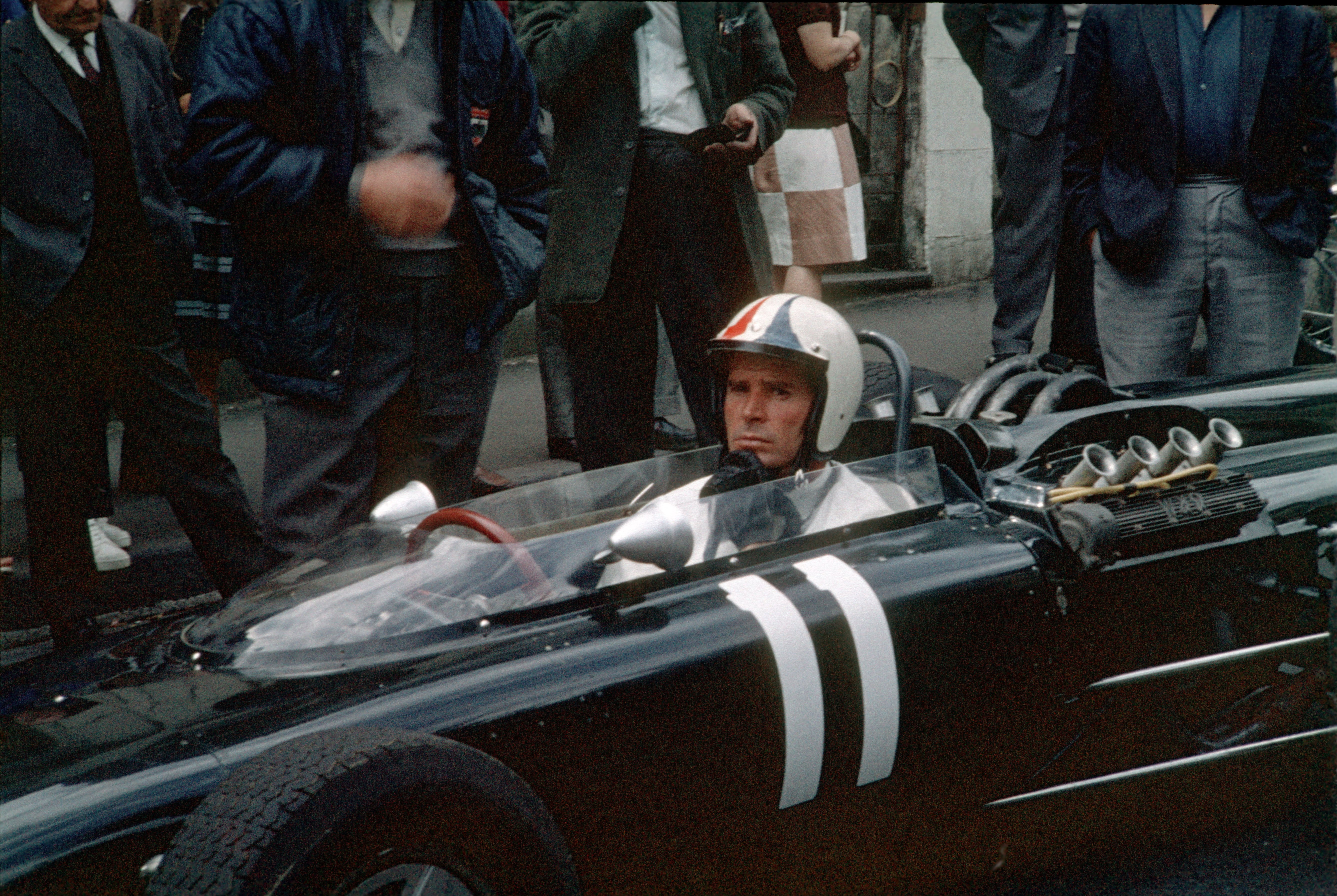 L'acteur américain James Garner lors du tournage du film Grand Prix, en 1966 à Royat (près du circuit de Charade).